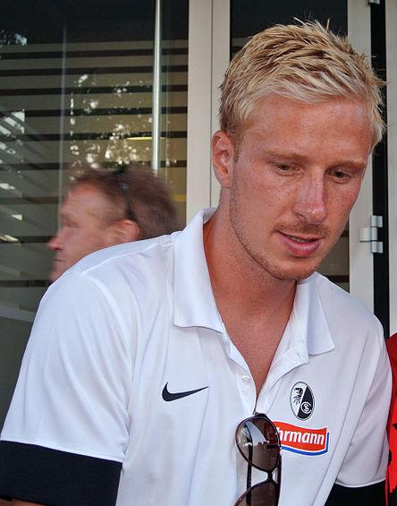 Mike Hanke nach dem Saisoneröffnungsspiel des SC Freiburg gegen Athletico Bilbao am 27. Juli 2013